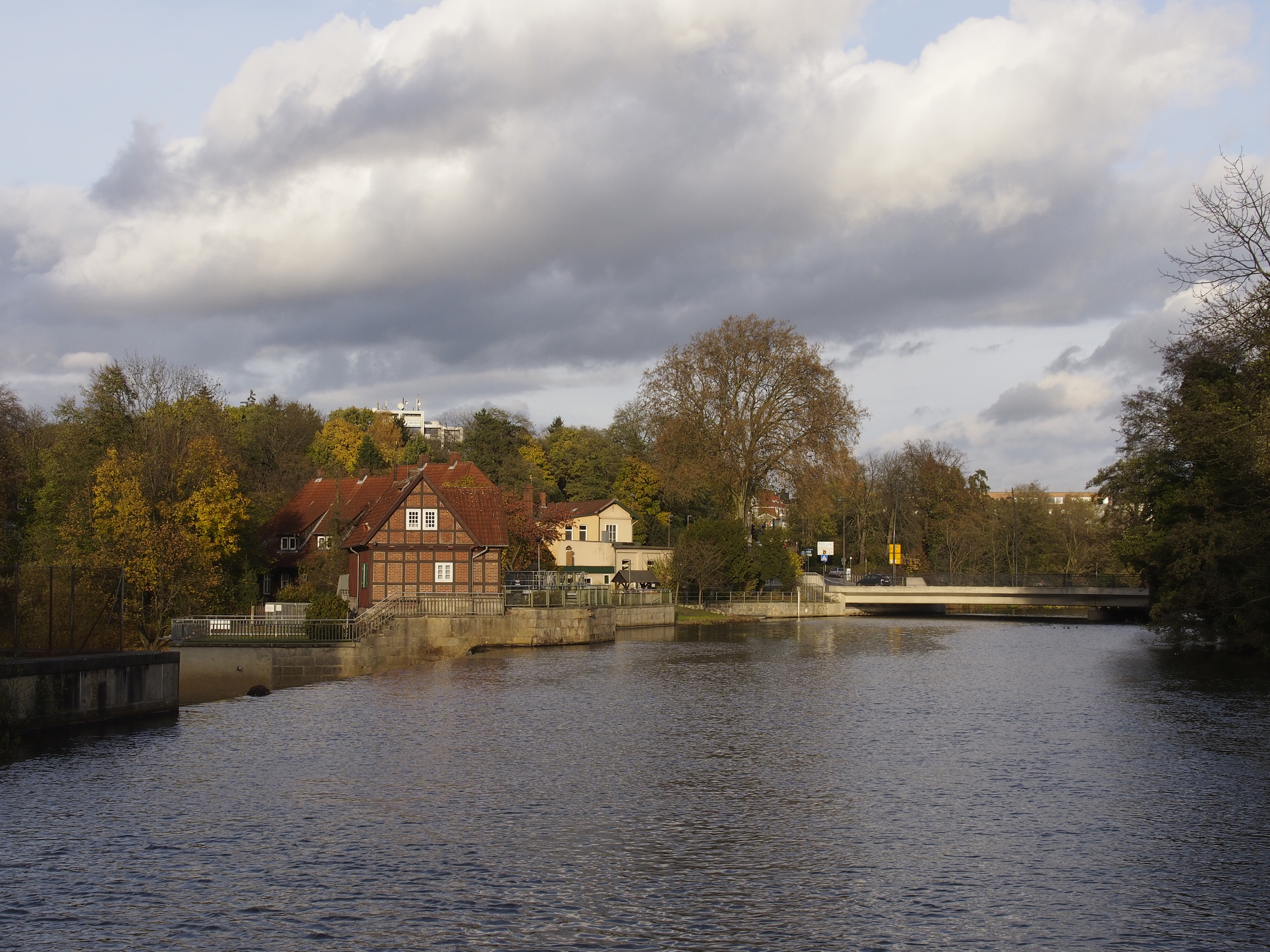 Die Aller in Celle mit Allerwehr und Brücke der B3